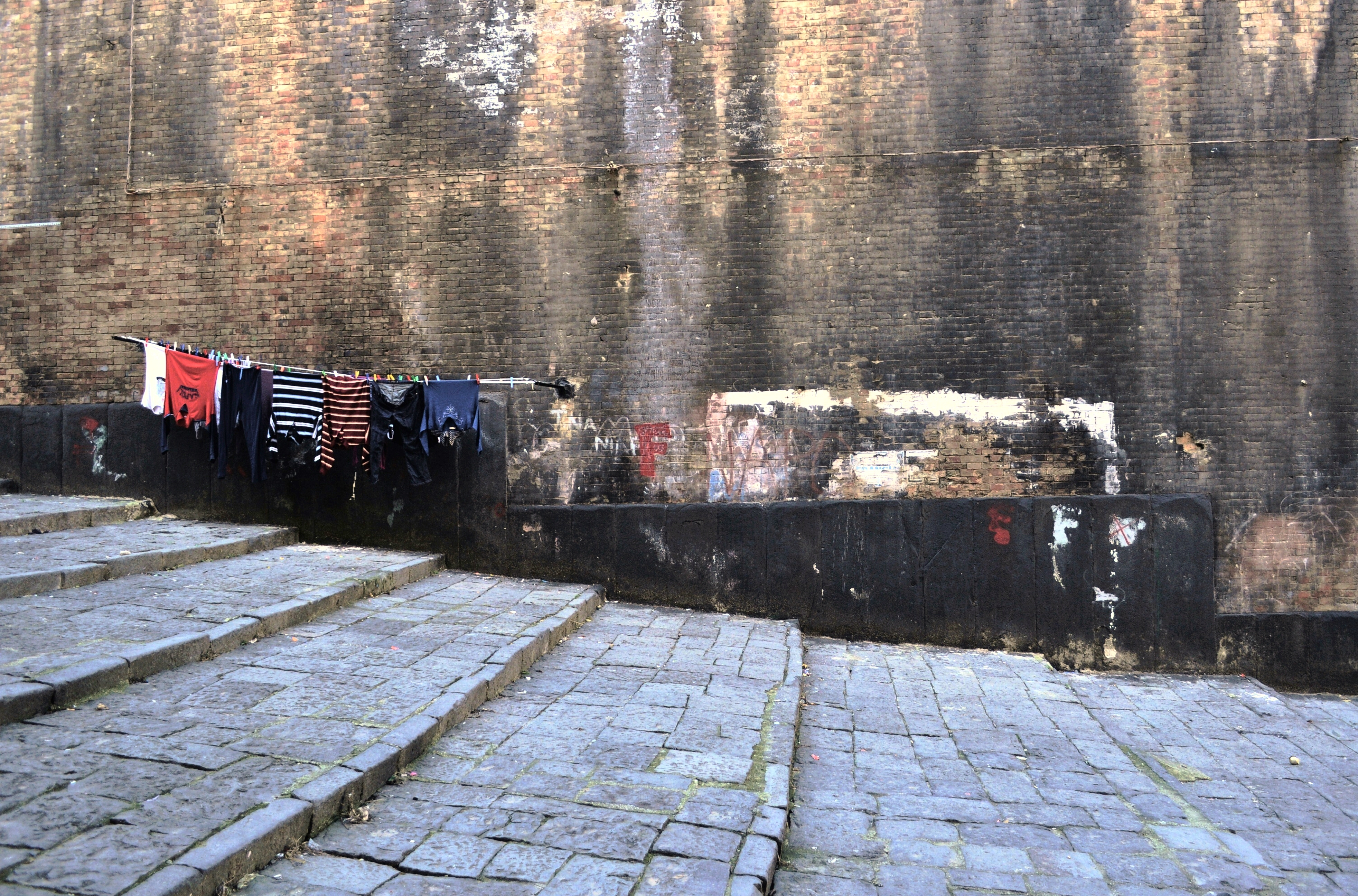 Scale a Santa Lucia